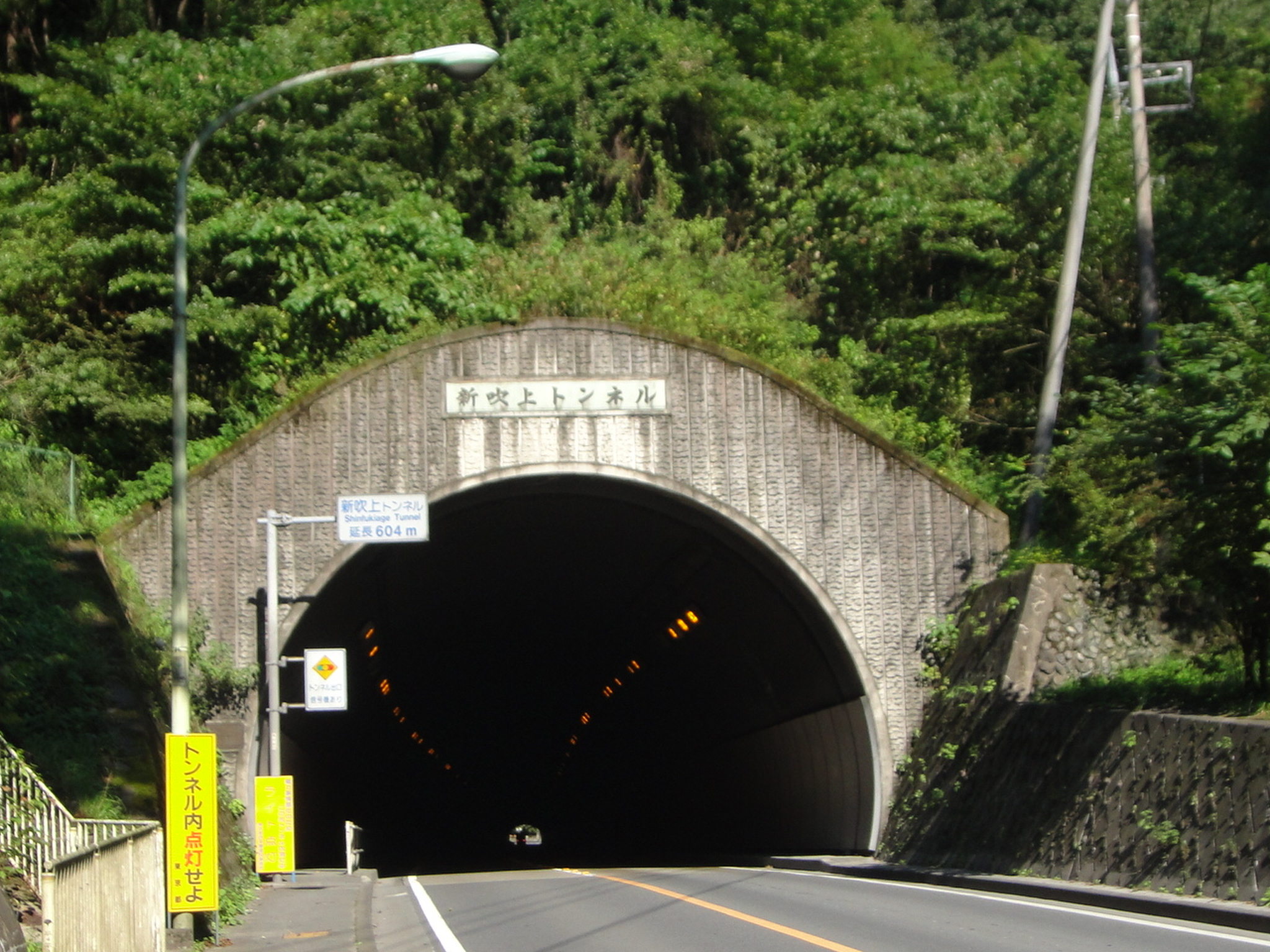 新吹上トンネル 南側